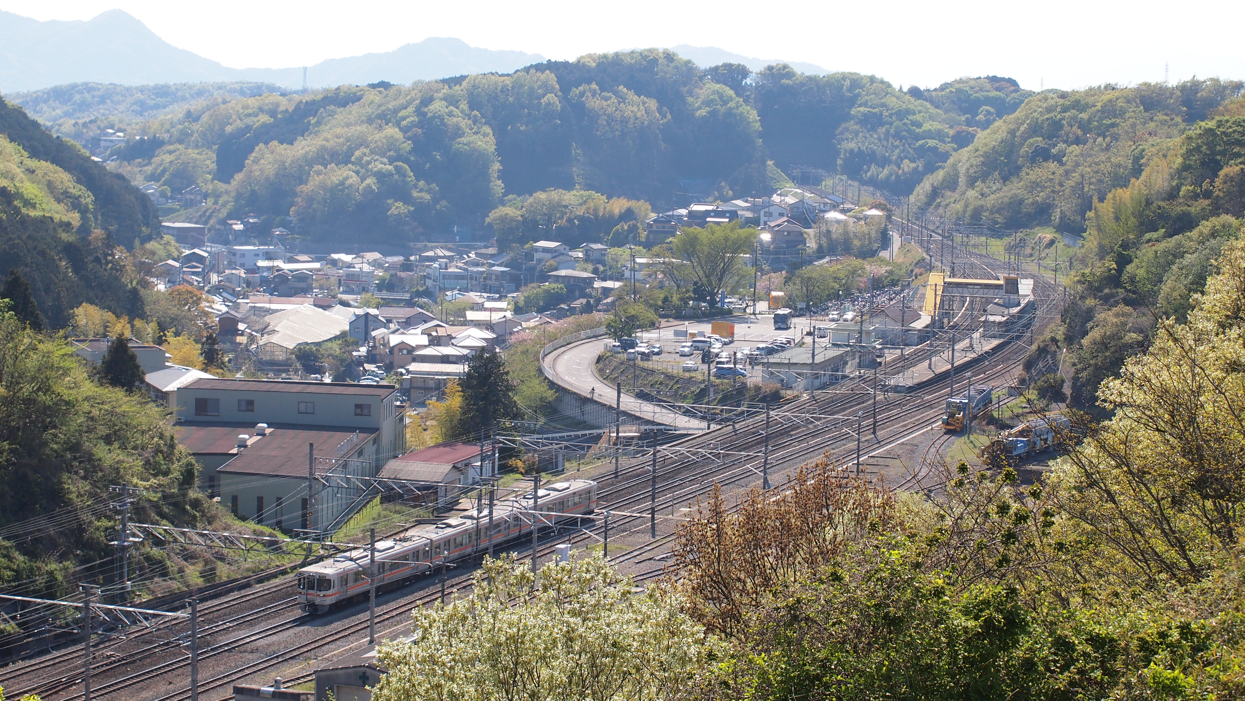 函南駅俯瞰